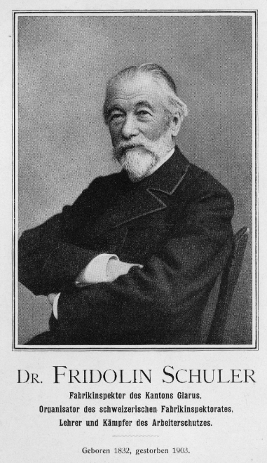 Fridolin Schuler, Fabrikinspektor (1832-1903) (Quelle: Scan)